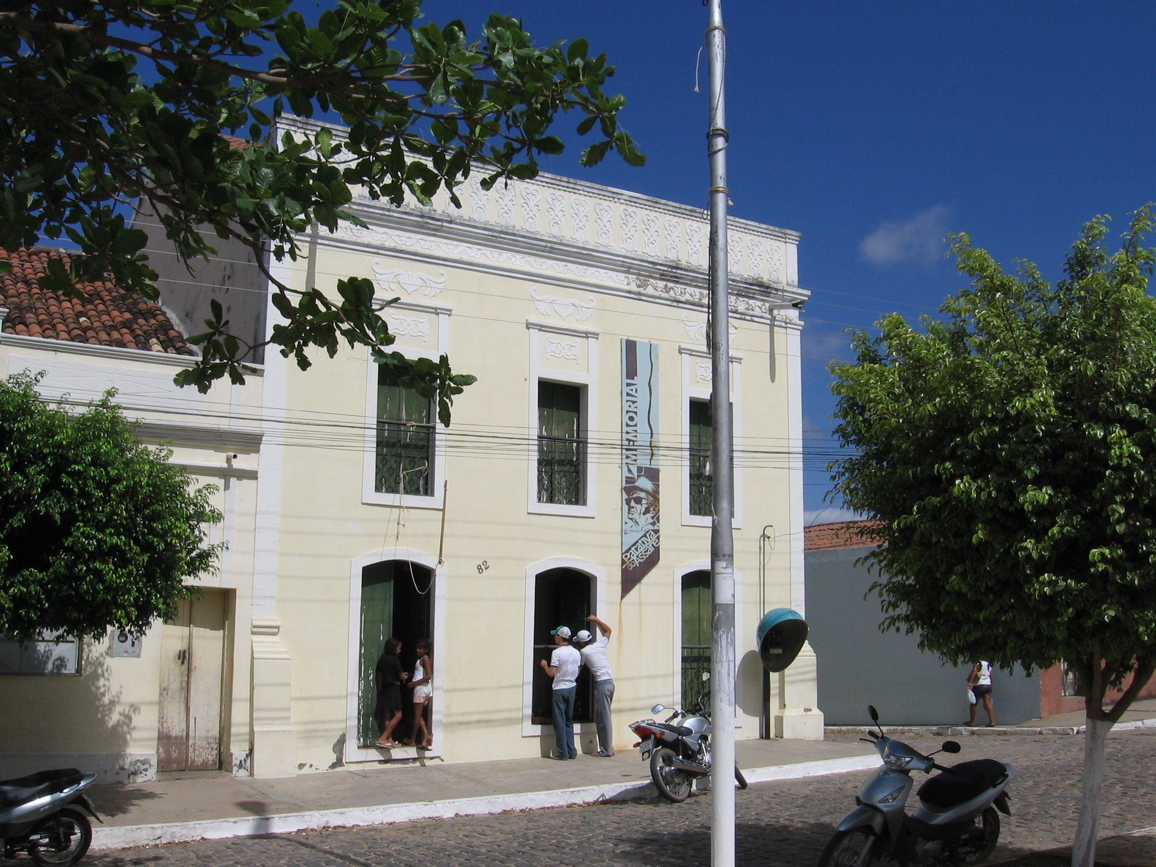 Memorial Patativa do Assaré, em Assaré, Ceará, Brasil. Foto de Allan Patrick, tirada em 22 de setembro de 2006.